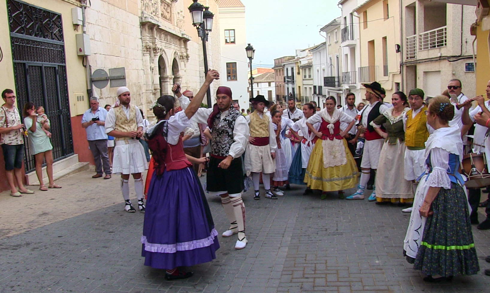 Ball dels Locos a l'Ollería